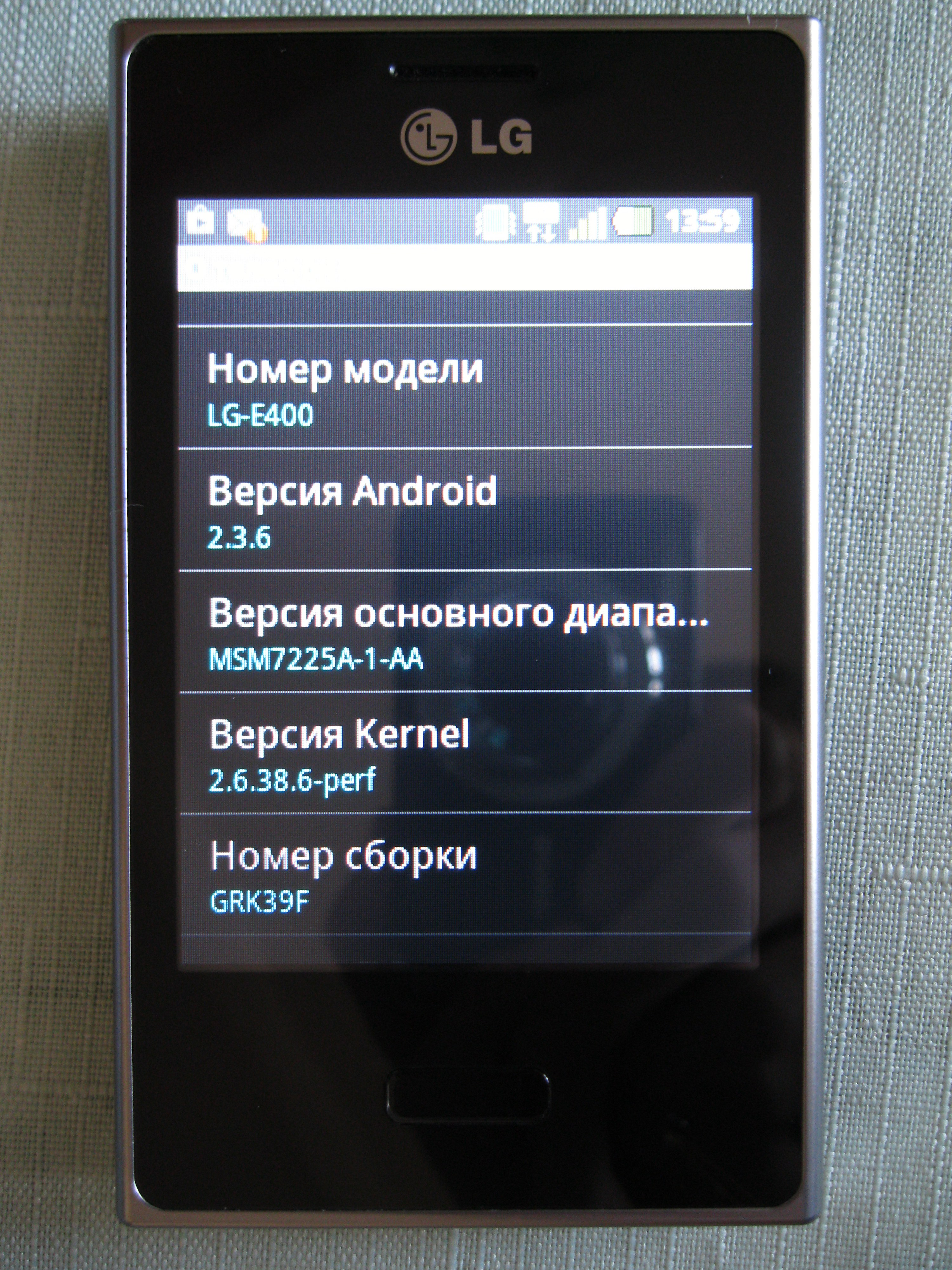 Дисплей LG Optimus L3 E400